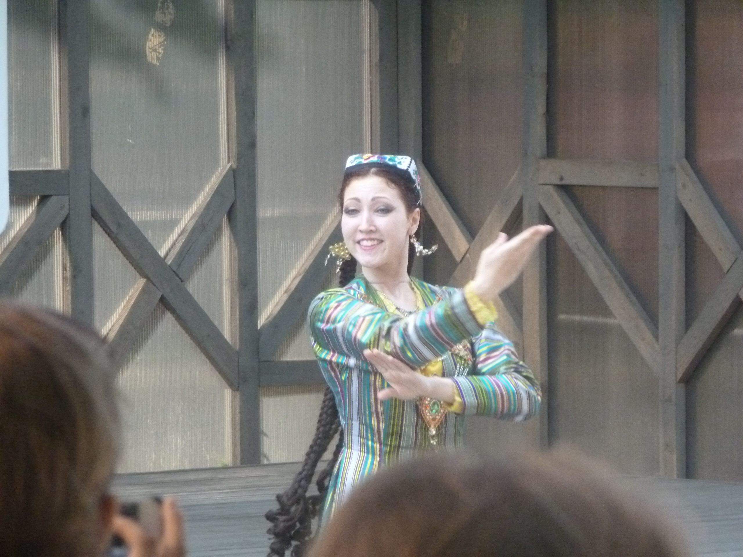 Выступление с узбекской песней в Музеоне, Москва (9 августа 2014)